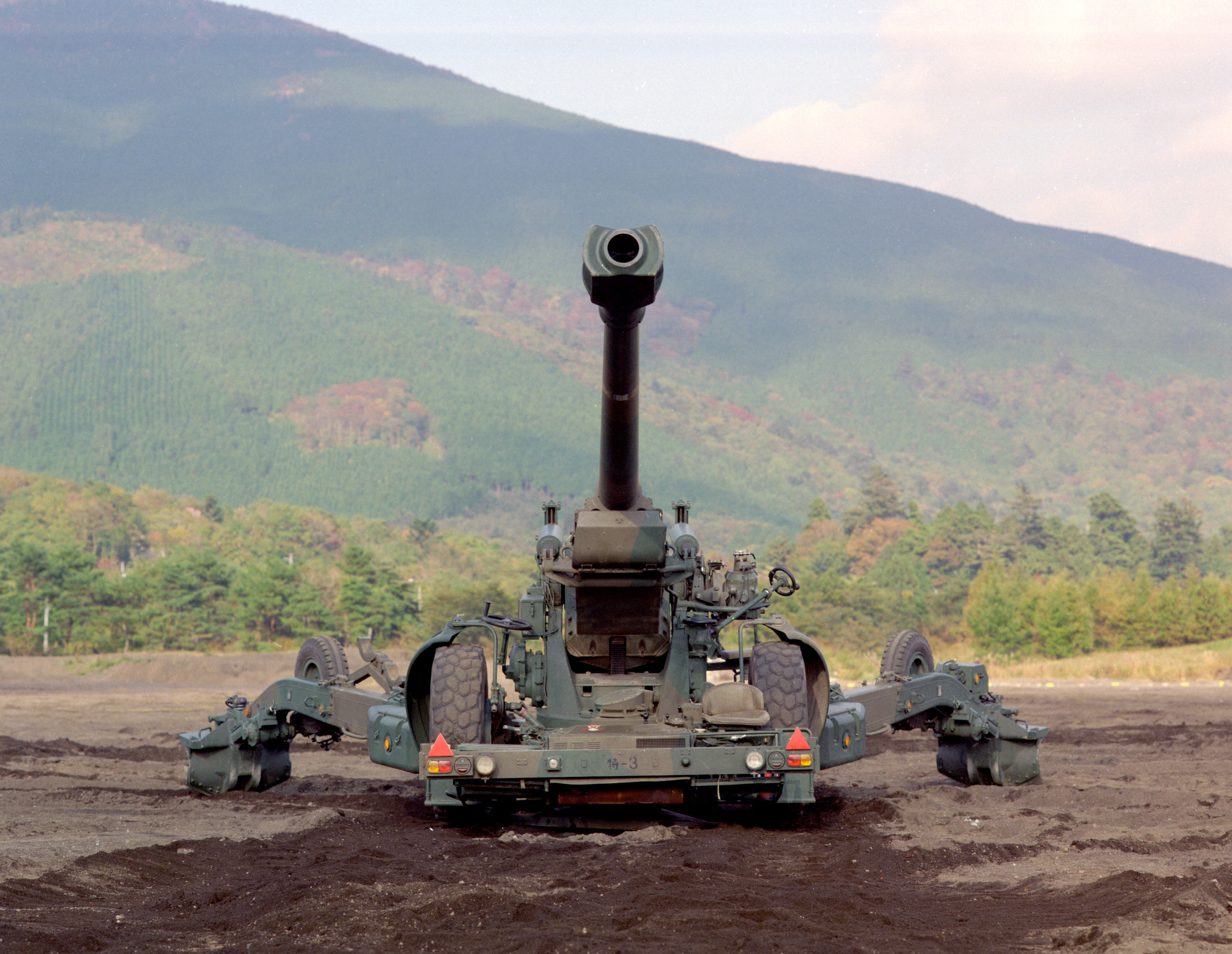 ○諸元等 [砲身長]6,022mm [口径]155mm [全備重量]約9,600kg [最大発射速度]6発/分 [最大射程] ・約30,000m（噴進弾） ・約24,000m（通常弾） [製作]日本製鋼所 中砲けん引車（ＦＨ７０用）でけん引。補助動力装置（ＡＰＵ）を有しており、最高速度１６ｋｍ／ｈで移動できる。操作人員は９人。